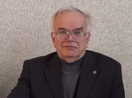 Фото Жана Терентьевича Тощенко.